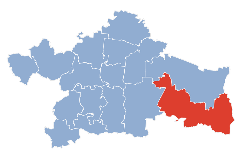 Gmina Michałowo, powiat białostocki, województwo podlaskie (na podstawie danych z